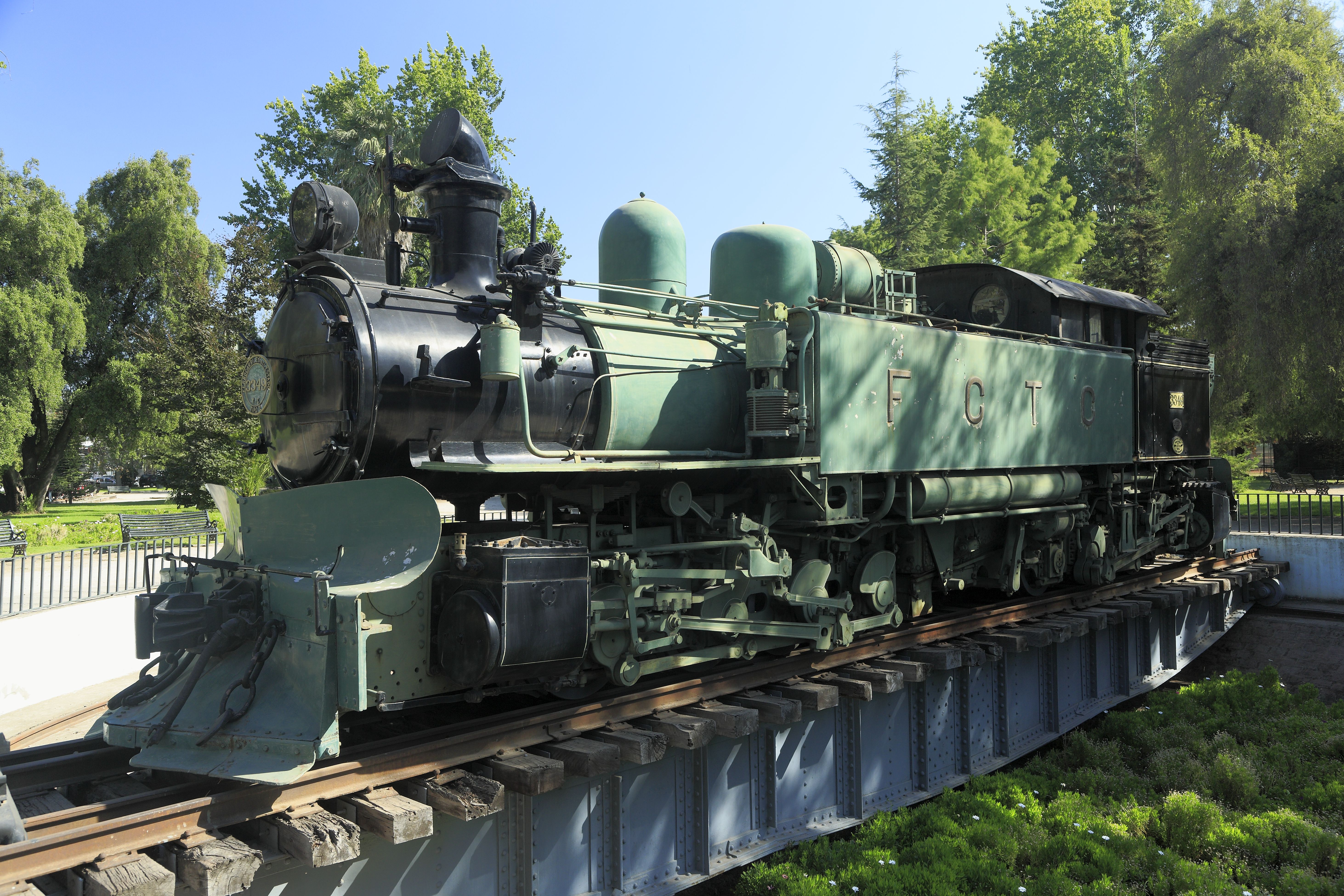 Kitson-Meyer-Gelenklokomotive, gebaut von Kitson & Co in Leeds 1909 für die Ferrocaril transandino zwischen Mendoza und Los Ándes. Die Maschinen laufen auf sieben Achsen, unter der Tenderseite sind es allerdings Laufachsen. Im vorderen Drehgestell sind alle vier Radsätze gekuppelt und damit angetrieben, die Achsfolge ist D’(3zz) n4. Die Flachschieber deuten auf den Betrieb mit Nassdampf hin.